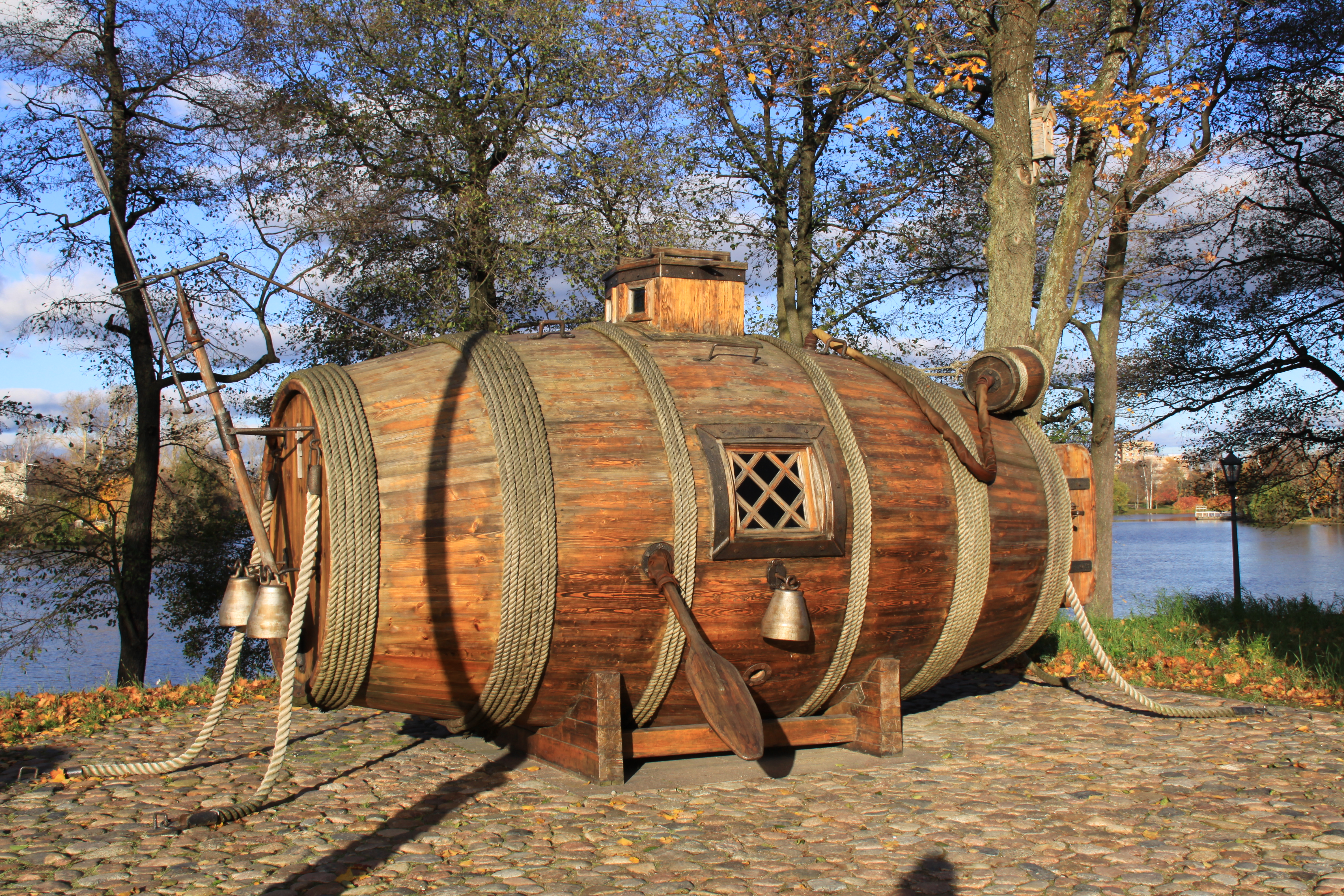 Испытание потаенного судна (прототип первой подводной лодки) происходило в 1721 г. в присутствии Петра I. Испытания проводились на реке Неве у Галерного двора. В г.Сестрорецке в память этому событию установили памятник